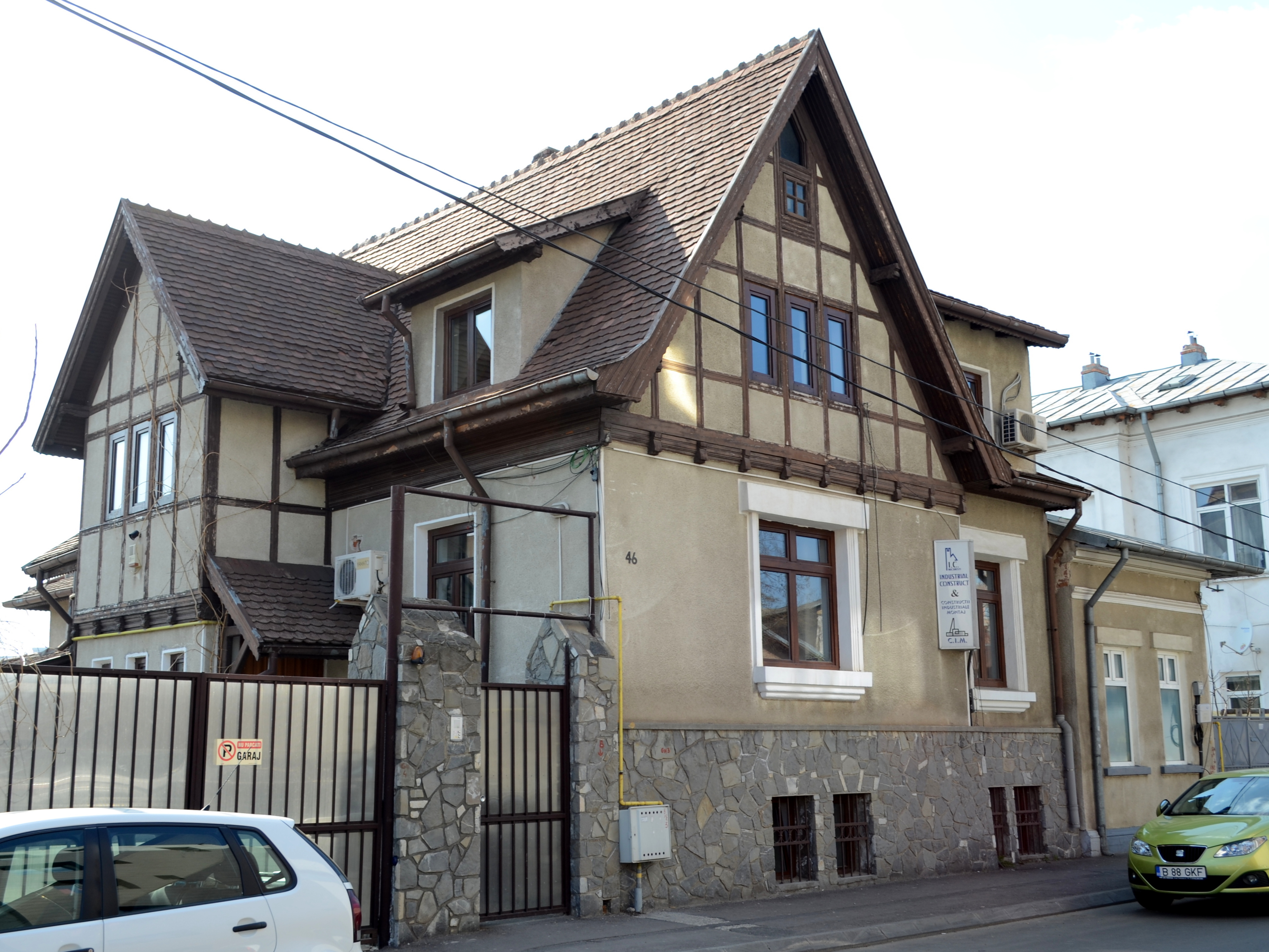 Casă, Str. Ion Minulescu nr. 46